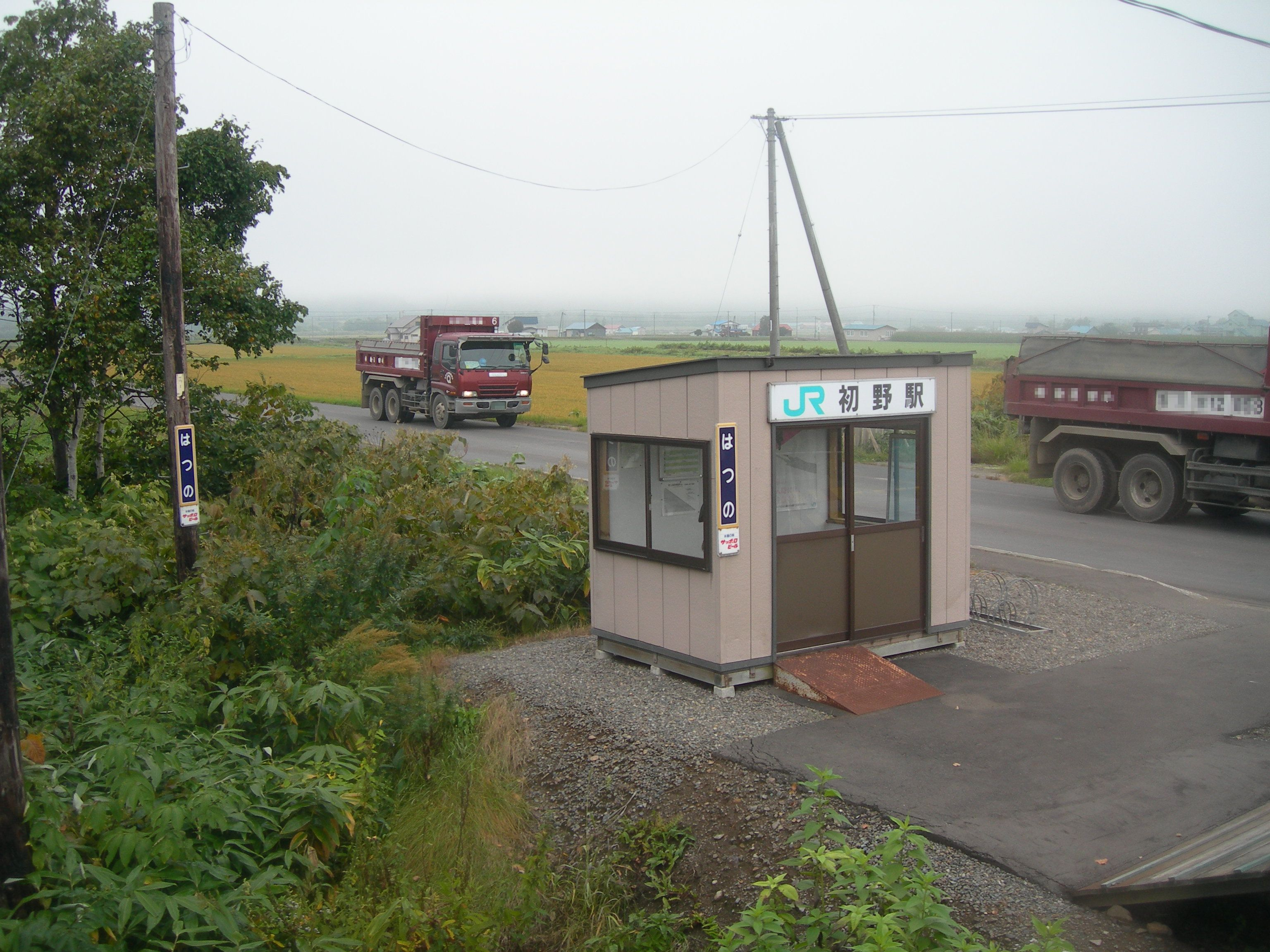 初野駅駅舎